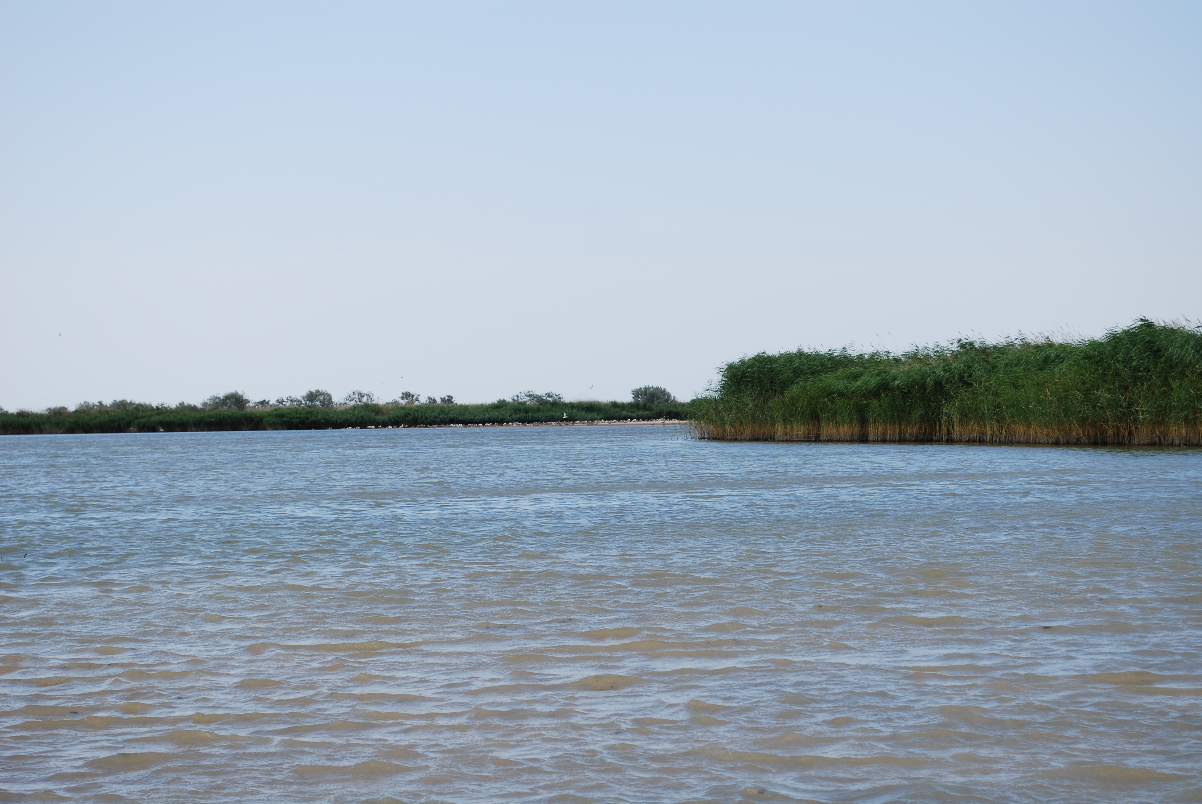 На острове